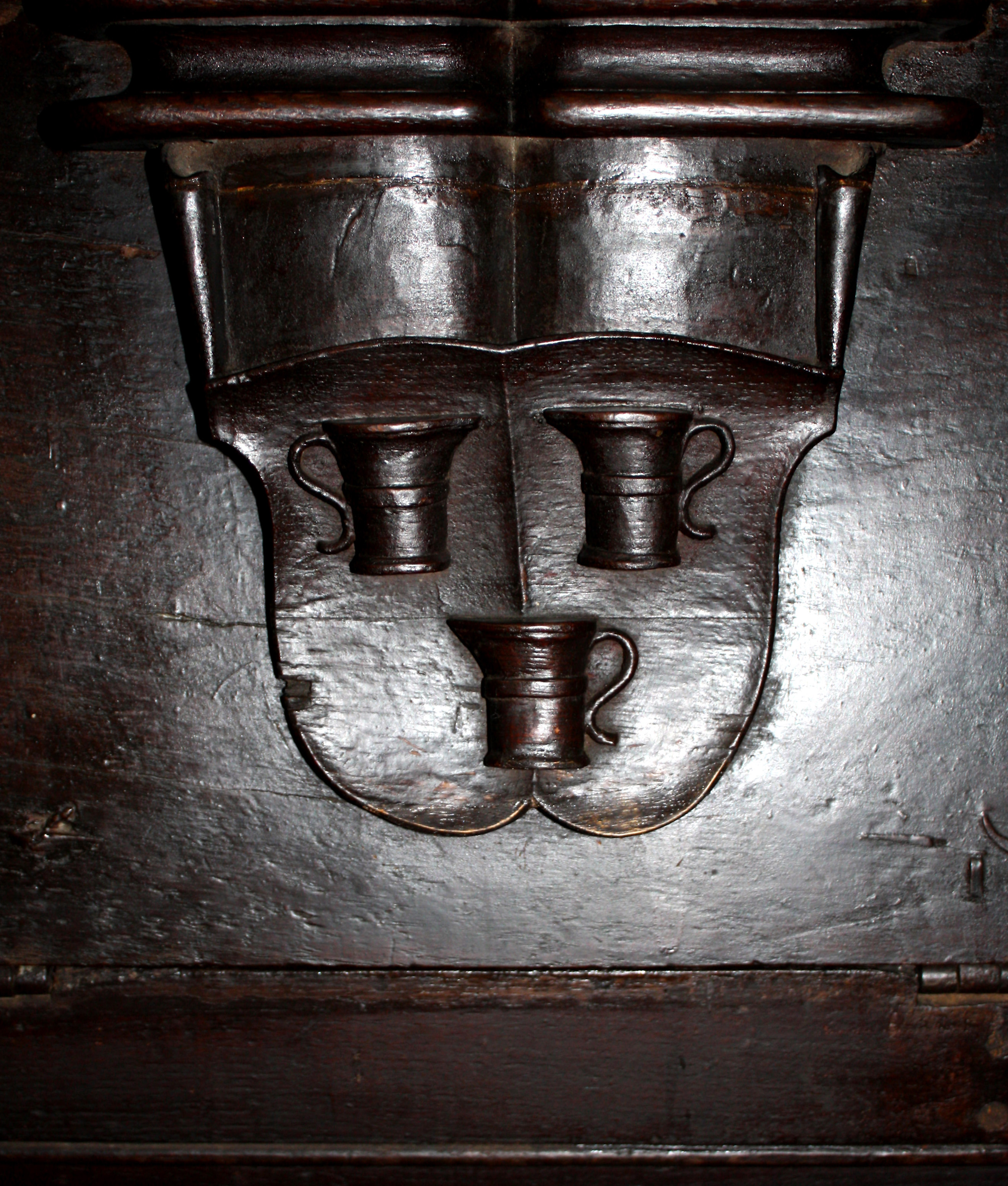 Hürth-Efferen, Chorgestühl Wappen der Kölner Patrizier Kannegießer